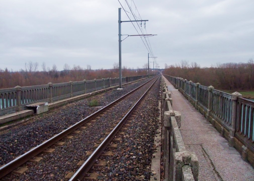 Peyraud détail